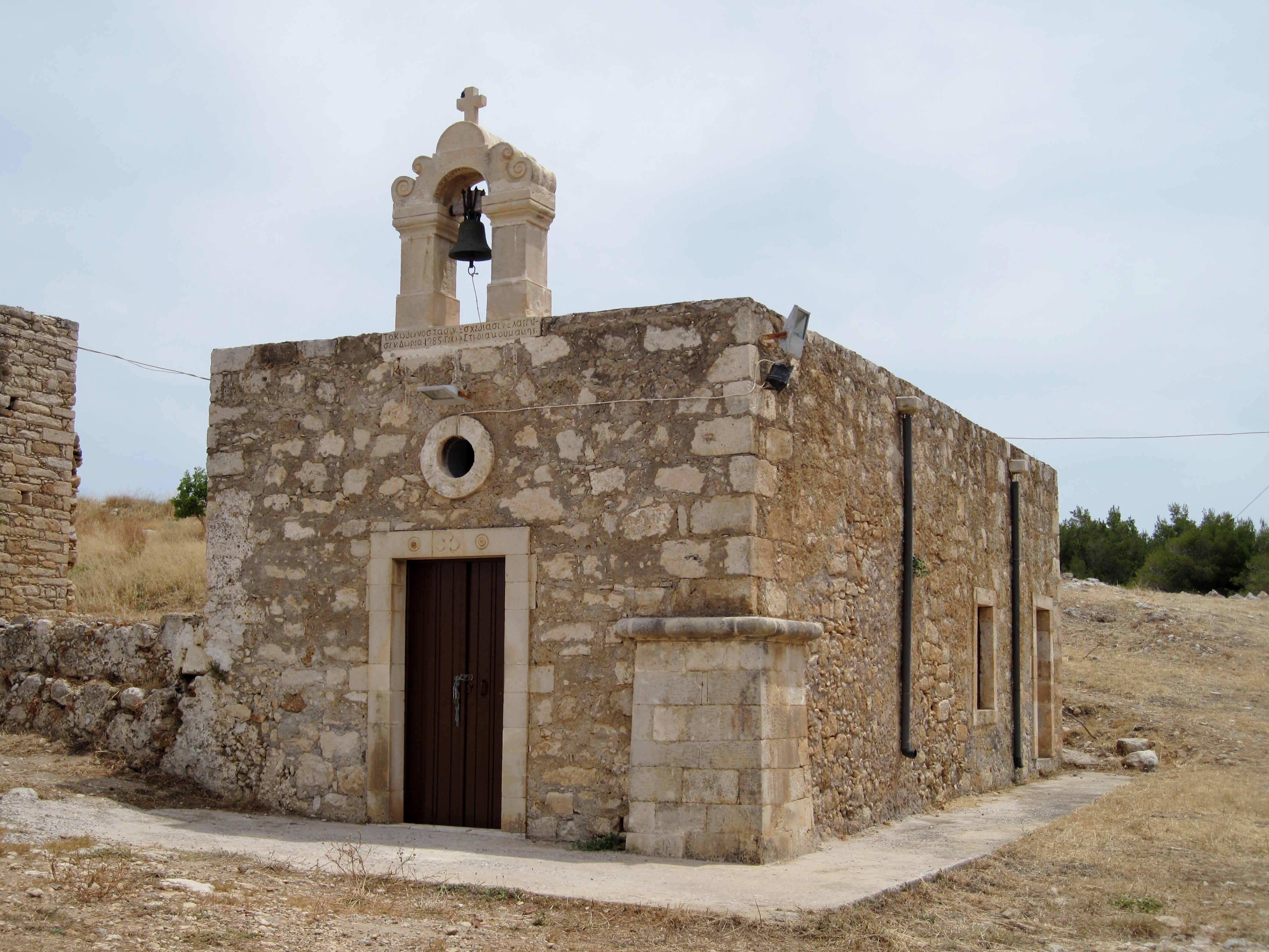 Kapelle der Heiligen Katharina in der Fortezza von Rethymno (Φορτέτζα του Ρεθύμνου), Festungsanlage innerhalb der Stadt Rethymno, Regionalbezirk Rethymno, Kreta, Griechenland